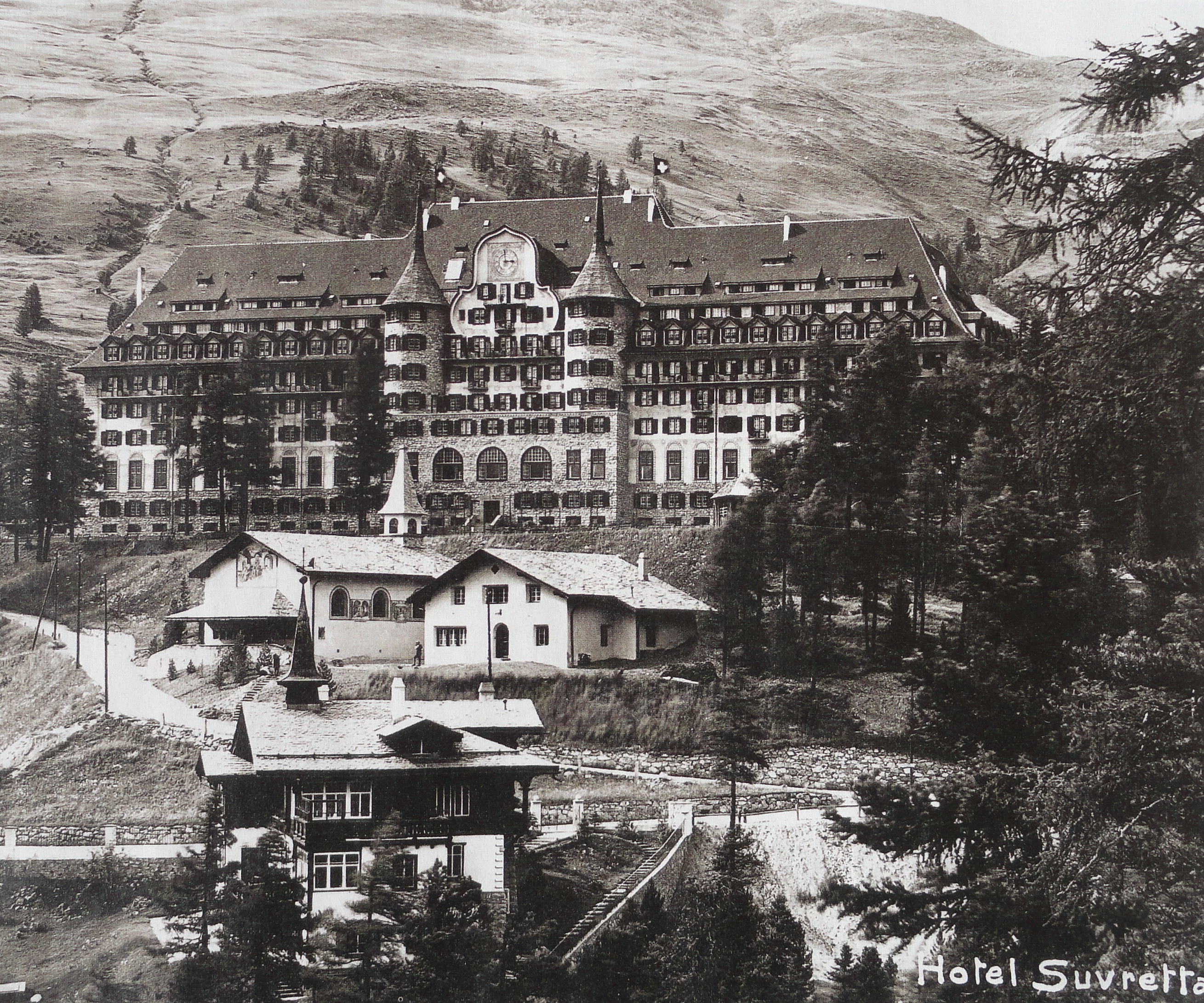 Suvretta House um 1914